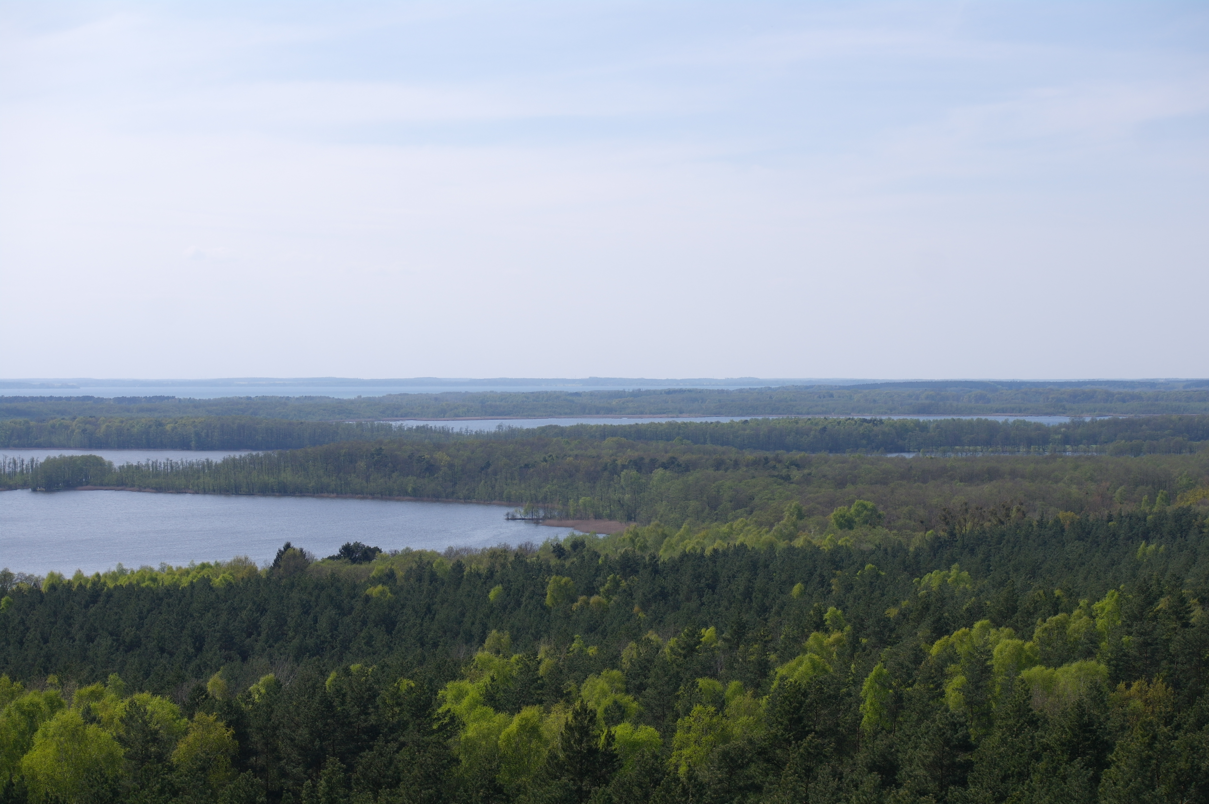 Aussicht im Müritz-Nationalpark: Blick vom Käflingsbergturm bei Speck in Richtung Müritz